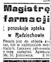 Grafika przedstawia fragment gazety z 1918 Kuryer Lwowski (Lemberger Courier), w którym użyto wyrażenia "magistra farmacji"